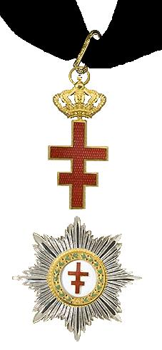 Een ster en kruis uit mij verzameling. De onderscheiding is een fantasie-orde, zie:Pseudo-Orde